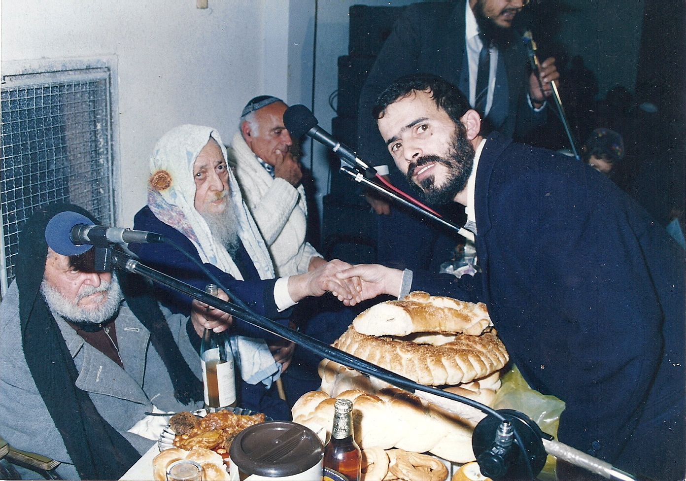 הרב רפאל כדיר צבאן לוחץ יד לרב נתן בוקובזה. משמאל - הרב סאסי כהן רב מושב ברכיה